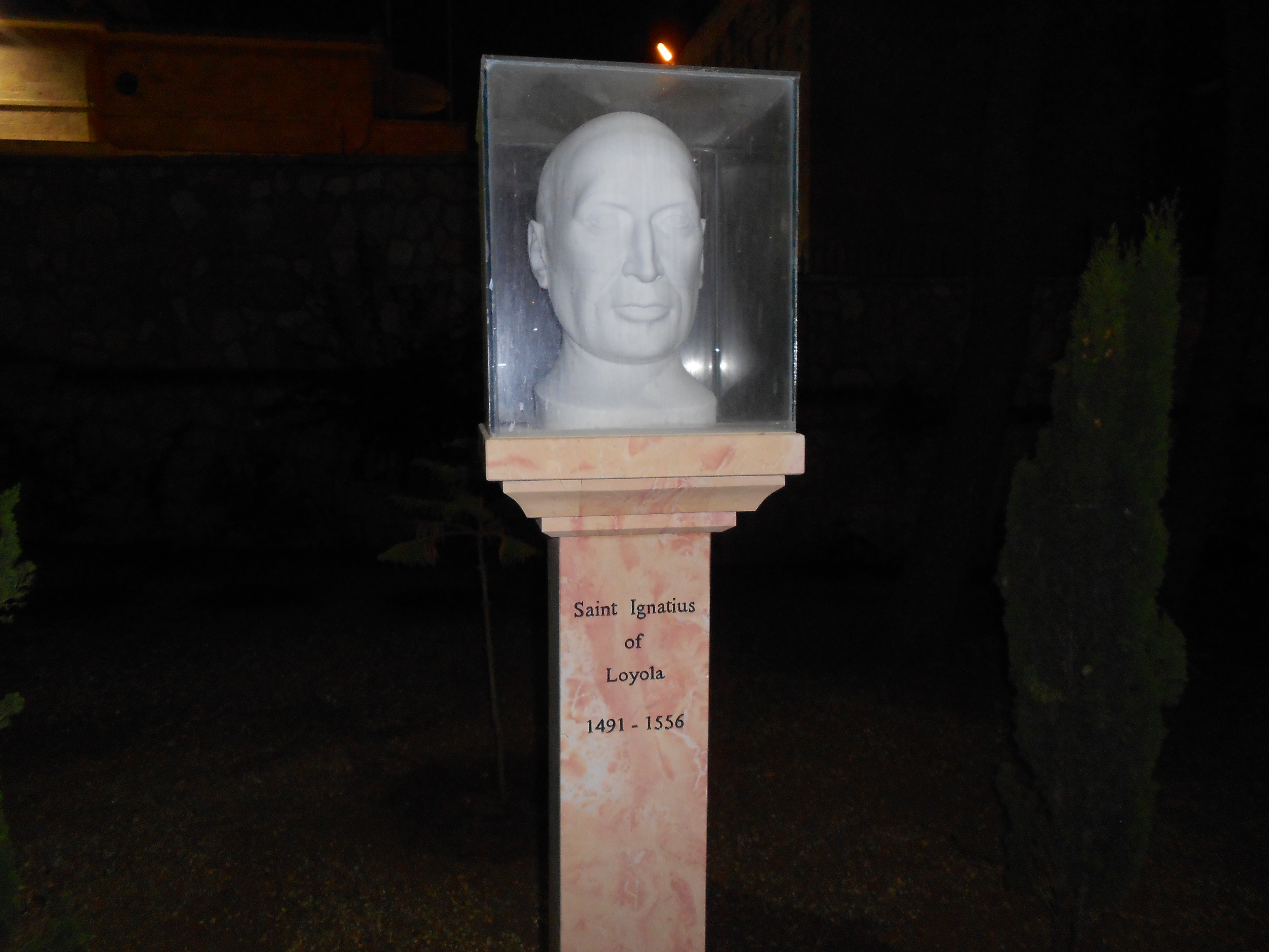 La Saint Ignace de Loyola à Jérusalem en 2018